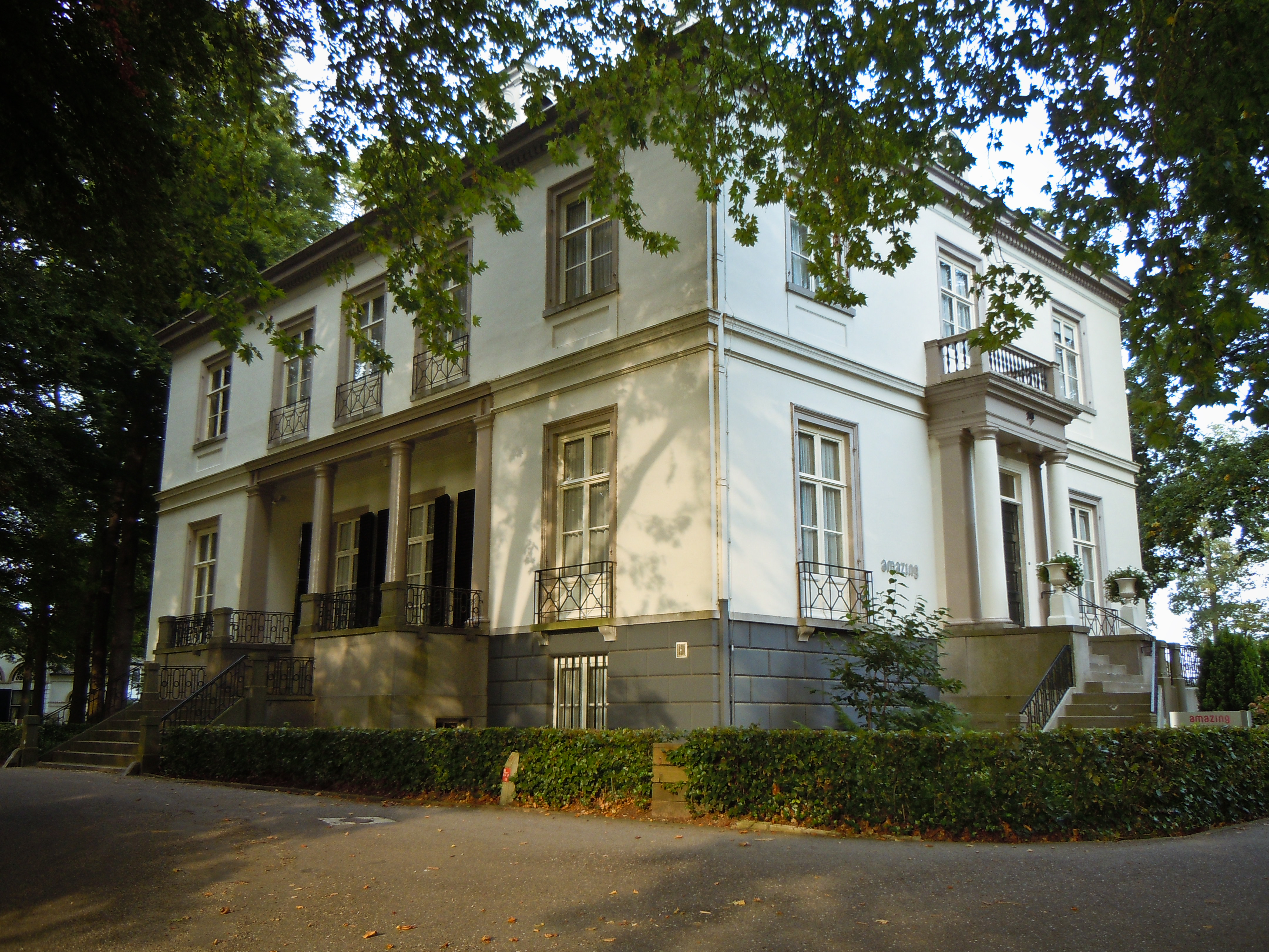 Kasteel Marialust in het Verzetsstrijderspark te Apeldoorn, NL.